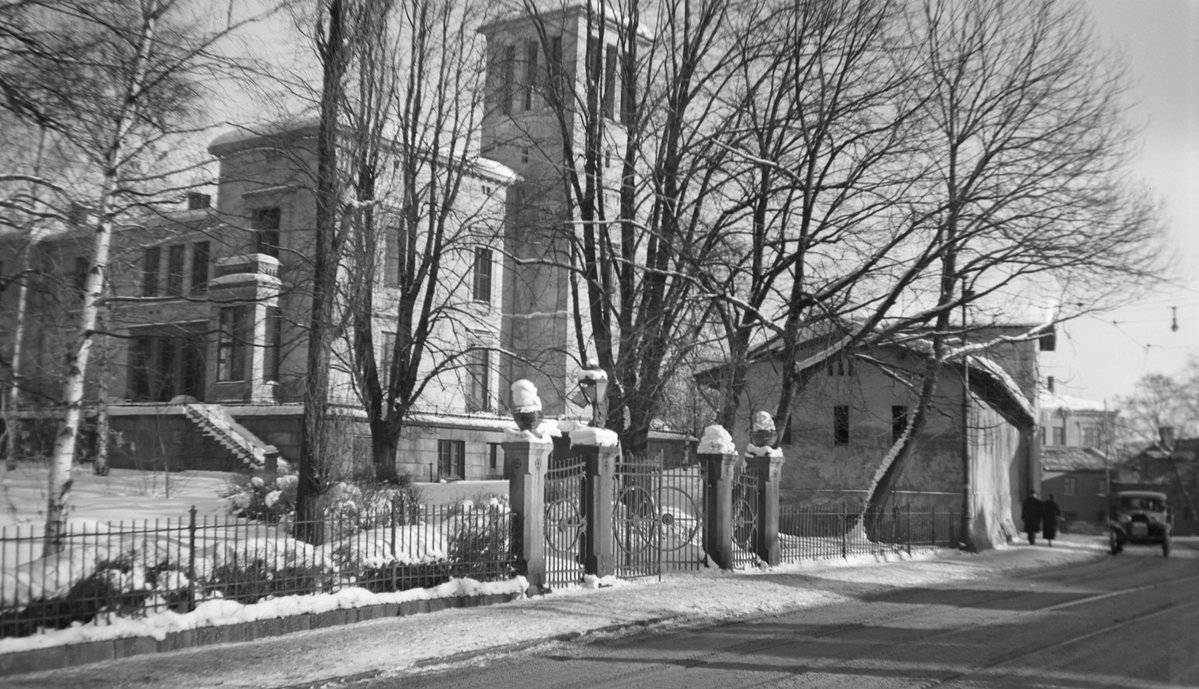 Rosenborg løkke i Drammensveien 60. Foto: Fritz Holland, februar 1937. Fra Byhistorisk samling hos Oslo Museum.